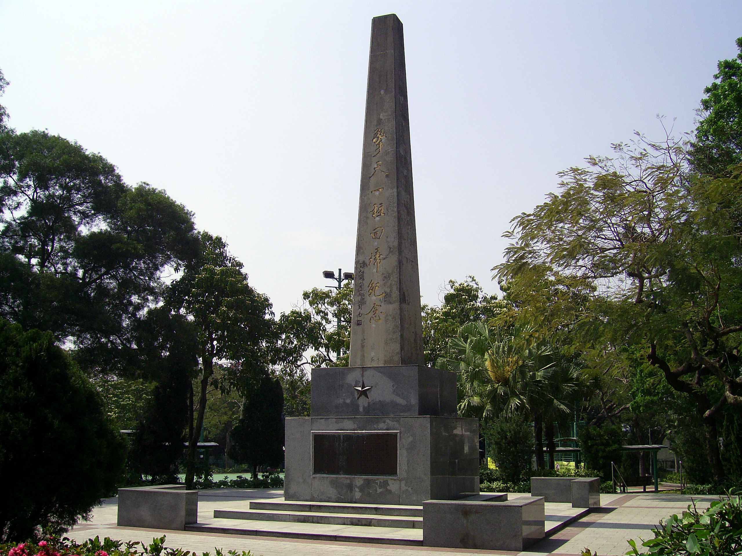 中文（香港）: 八鄉回歸紀念柱